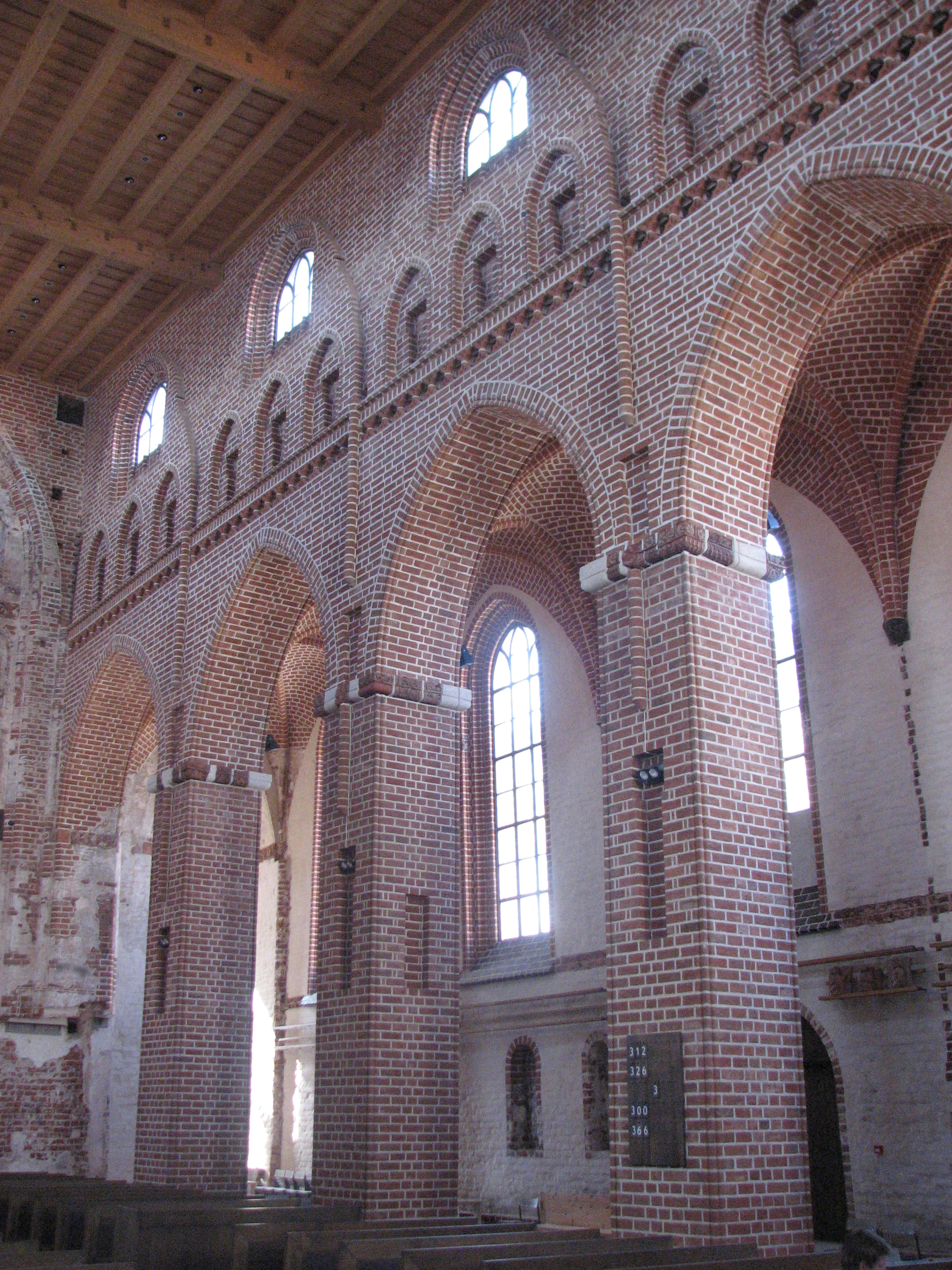 Tartu Jaani Church, Tartu, Estonia